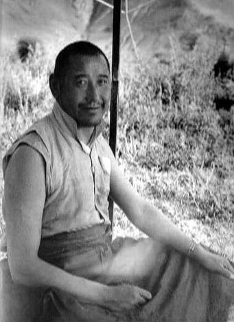 德木·丹增嘉措